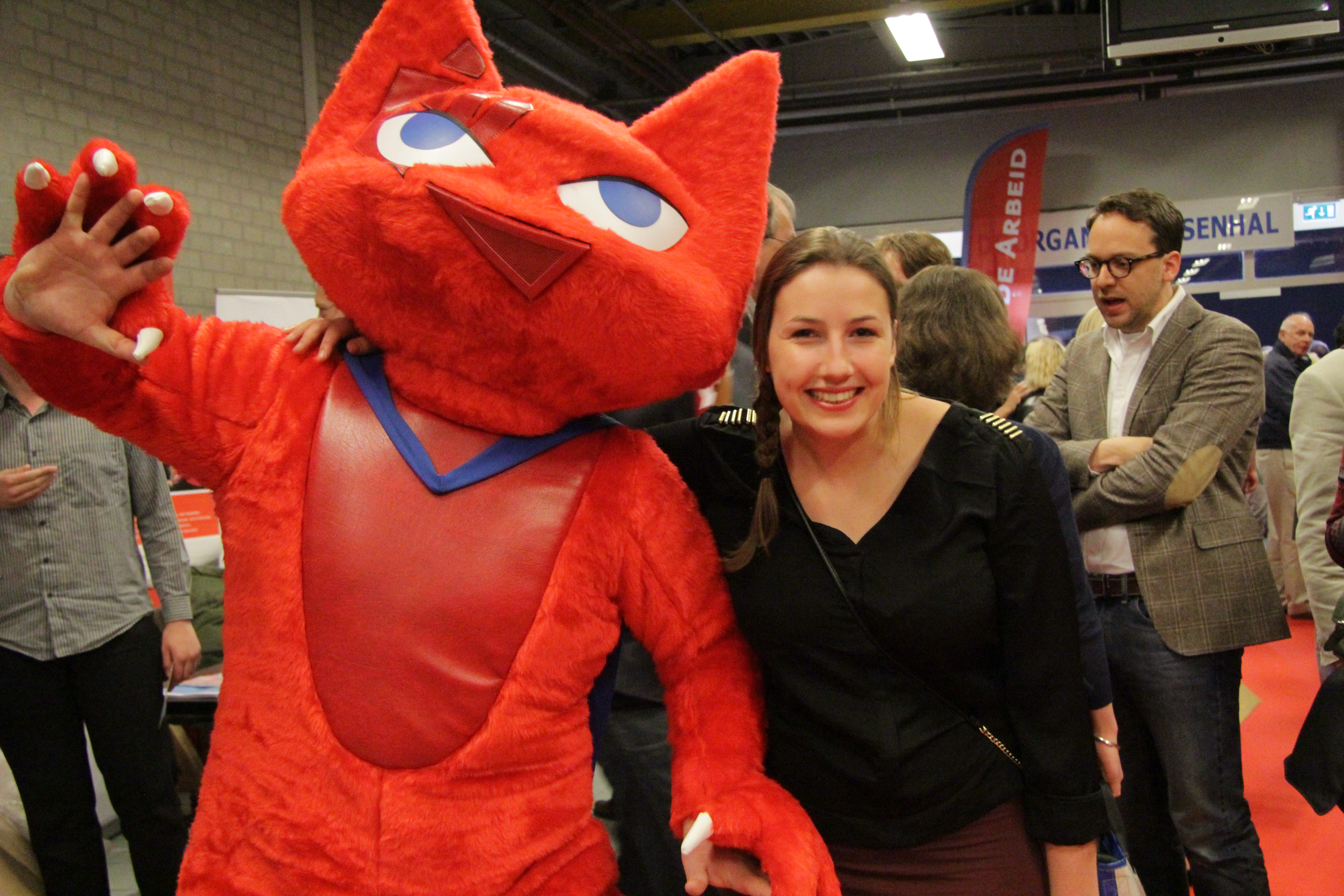 Mascotte van de Jongere Socialisten: Het rode gevaar